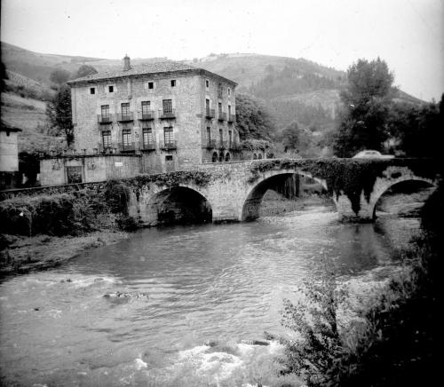 Fotografía de 1963